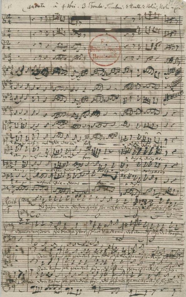 Johann Sebastian Bach, erste Seite der autographen Partitur BWV 30a "Angenehmes Wiederau"